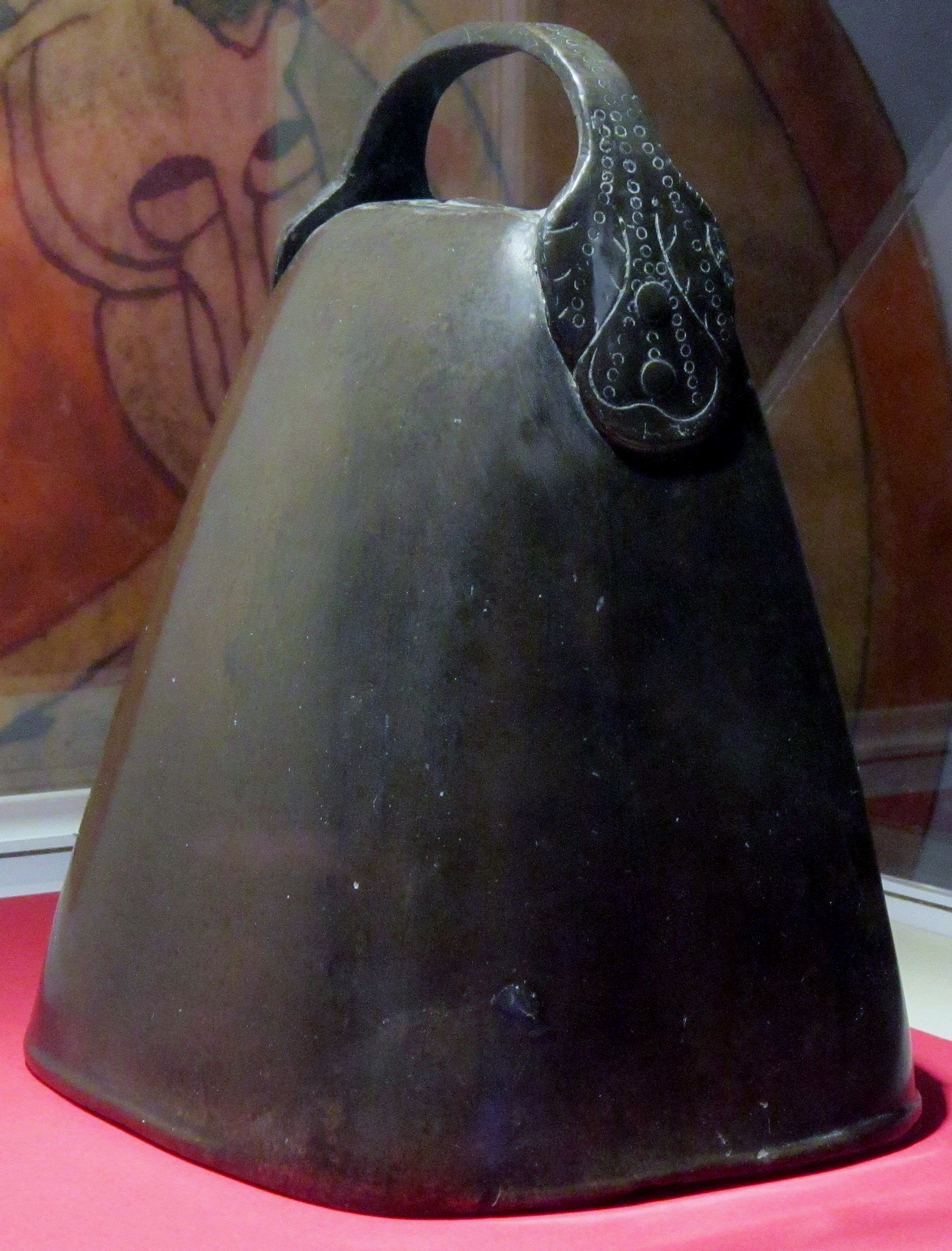 La cloche à main de saint Pol Aurélien datant du Haut Moyen-Âge (l'original se trouve dans la cathédrale de Saint-Pol-de-Léon ; il s'agit ici de la photographie d'un facsimilé de cette cloche exposé au musée de l'abbaye de Landévennec). Seules six cloches à main sont conservées en Bretagne dans quatre datent du Haut Moyen-Âge. Il en existe de semblables en Ecosse, Irlande et Pays de Galles.